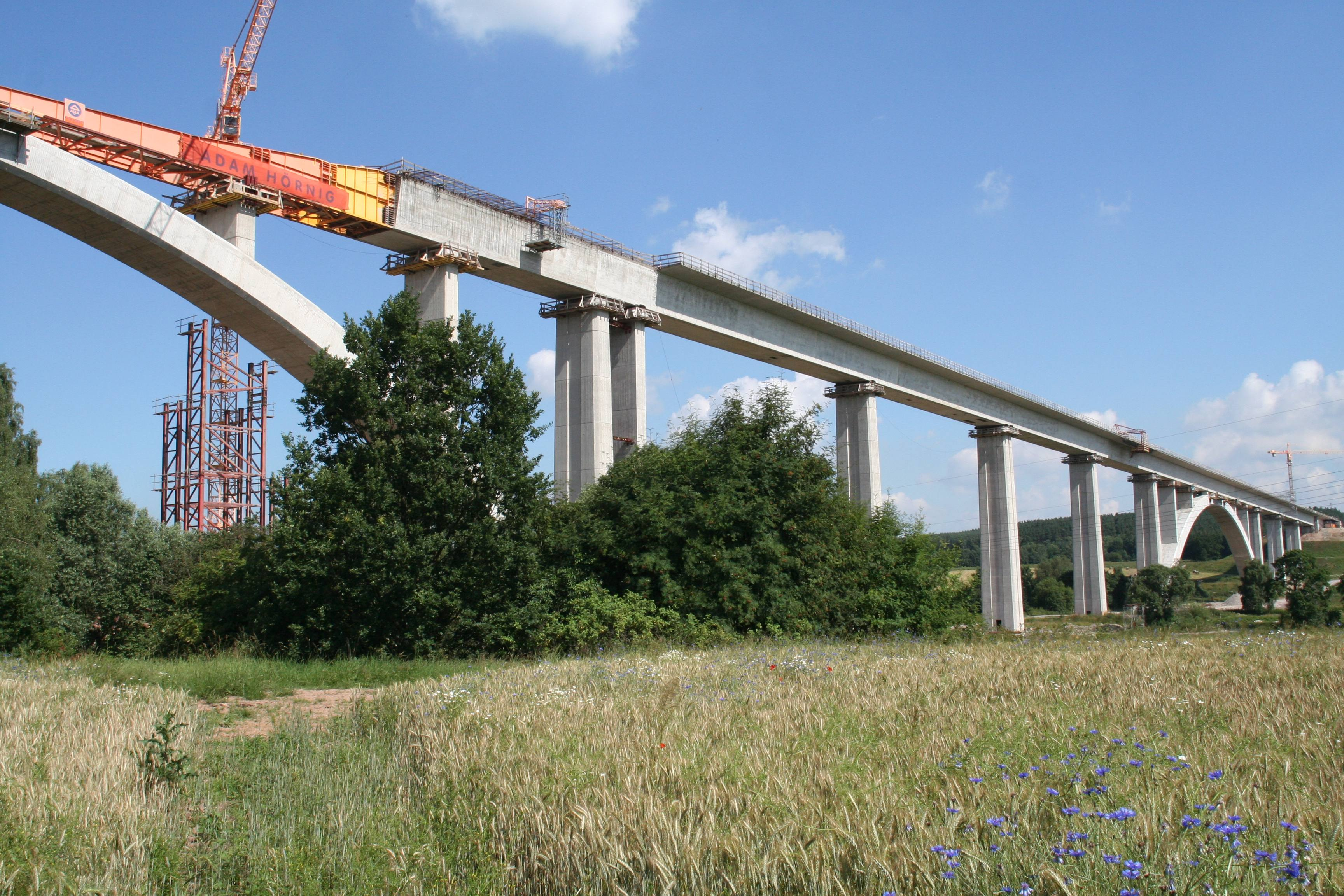 Ilmtalbrücke Landkreis Ilmtal